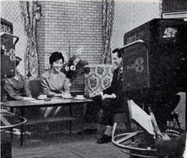 フジテレビ『スター千一夜』に出演する島津貴子（1960年）